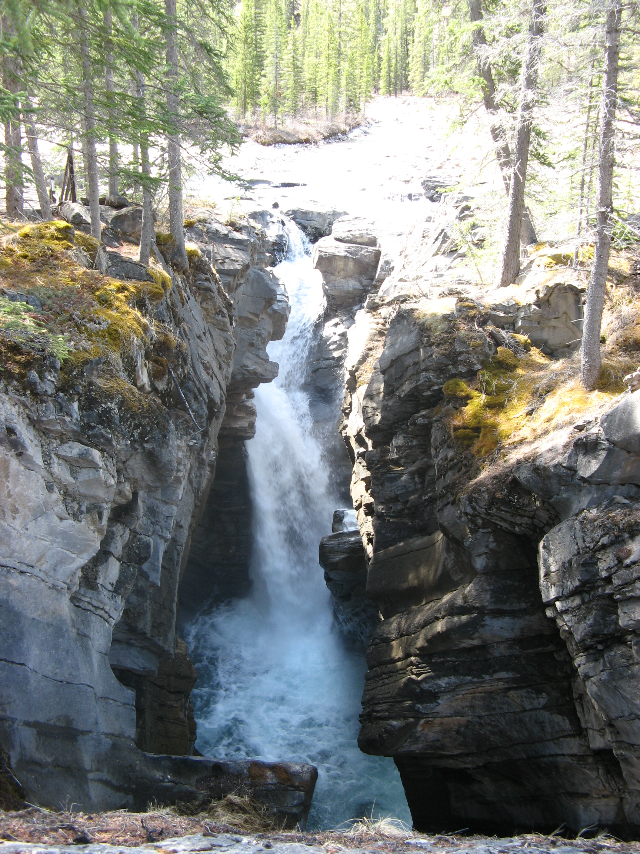 Siffleur Falls